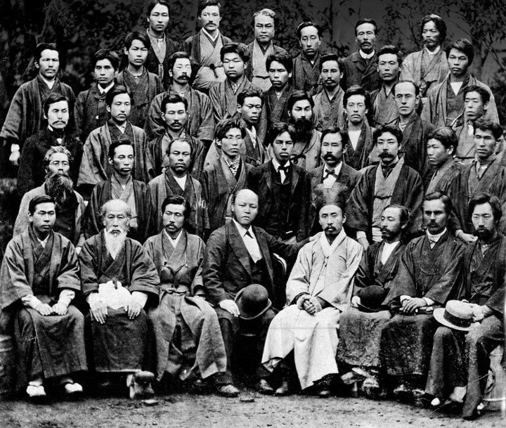 1883年5月12日に東京九段下で撮影された第三回全国基督教信徒大親睦会の幹部の集合写真。